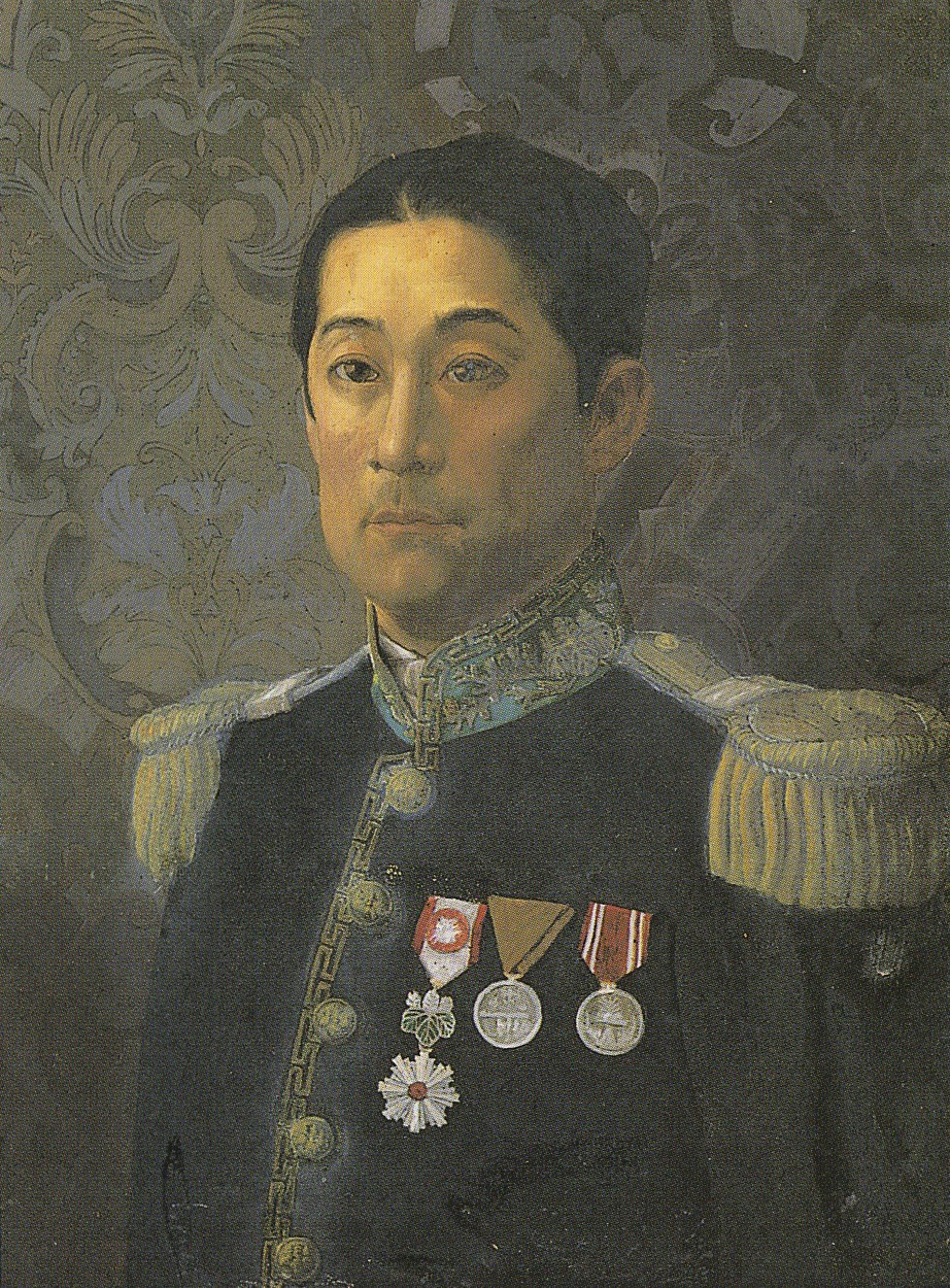 徳山毛利家十代当主・毛利元功の肖像画。